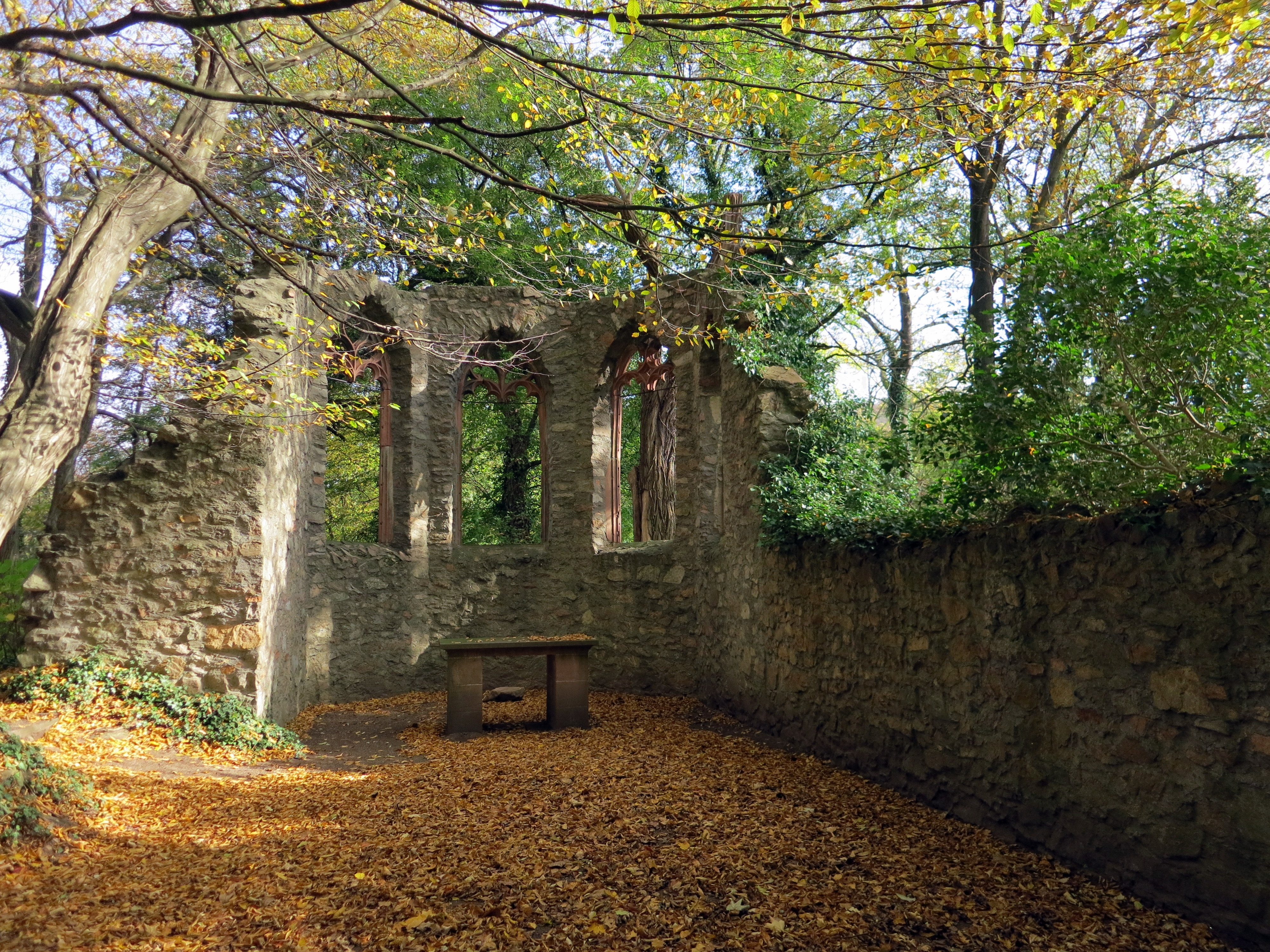 Klosterruine